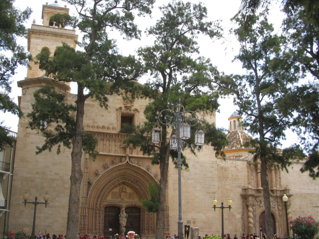 Iglesia de Santiago Apostol de Orihuela